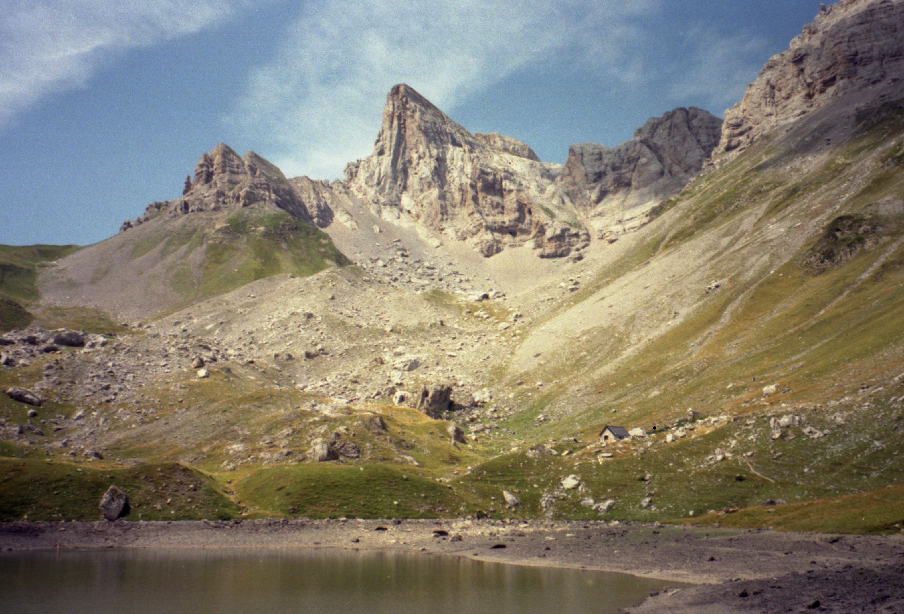 Pic des trois Rois and Table des trois Rois view from Lac de Lhurs